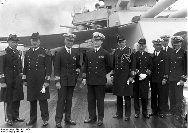 Amerikanische Schlachtschiffe besuchen das erste Mal nach dem Kriege Deutschland! In Kiel traf das erste Mal nach dem Kriege ein aus den amerikanischen Schlachtschiffen "Arkansas", "Florida" und "Utah" bestehendes Geschwader unter Führung von Admiral Cluverzius ein. Von den deutschen Linienschiffen "Hessen" und "Schleswig Holstein" wurden zu ihrer Begrüßung 21 Schuss Salut gefeuert. - Der Commandeur der amerikanischen Schlachtschiffe Admiral Cluverius (der Dritte von links) mit seinem Stab an Bord des Flagg-Schiffes "Arkansas".